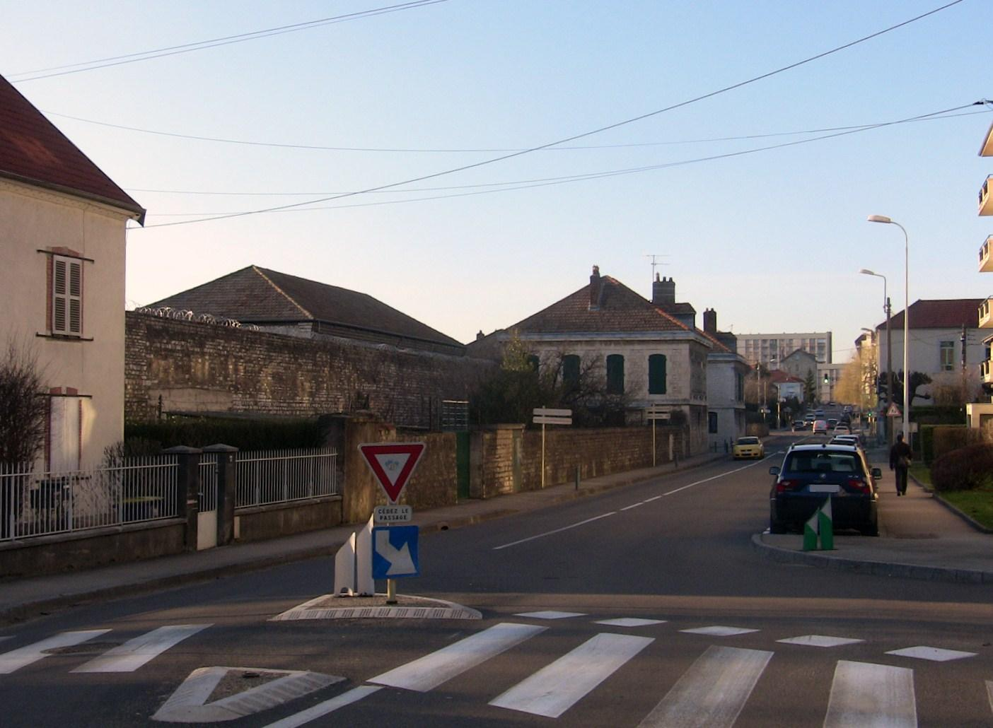 La maison d’arrêt de Besançon (Doubs, France).